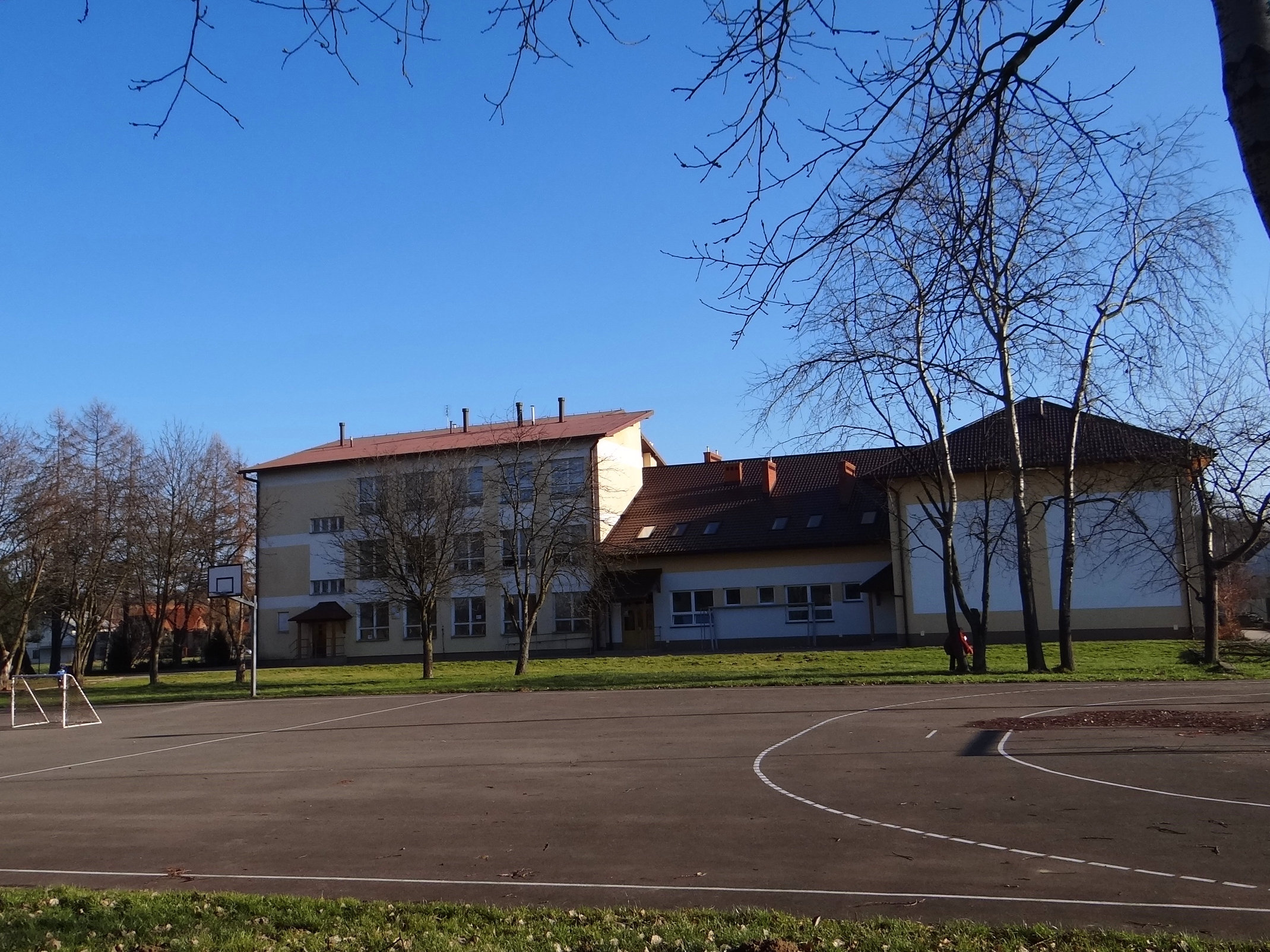 Zespół szkół w Siedlcu